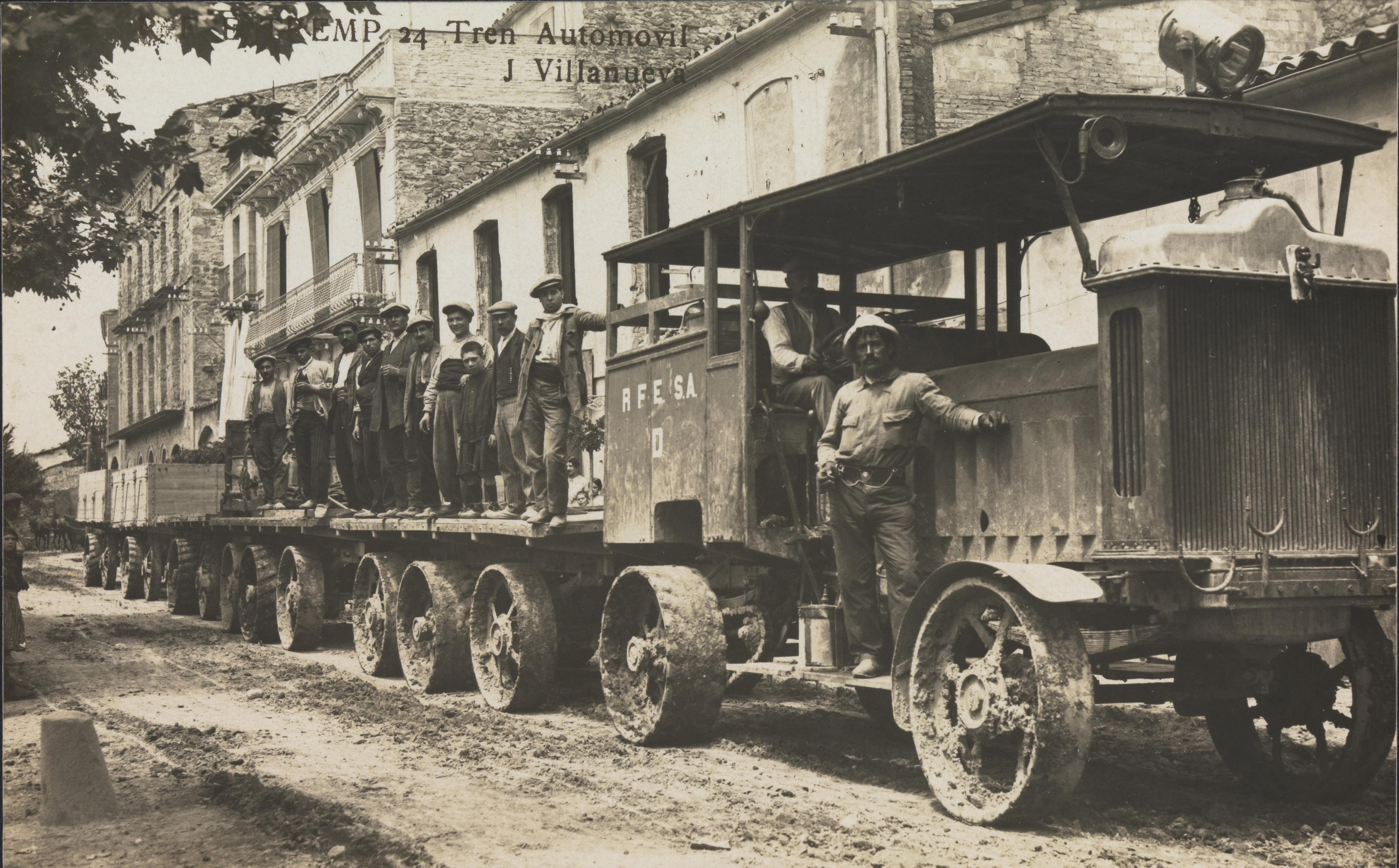 Tren Renard – Daimler, amb els 4 remolcs Renard, a Tremp, per les obres de la central hidroelèctrica de Talarn (Pallars Jussà) Foto procedent de la Biblioteca Nacional de Noruega